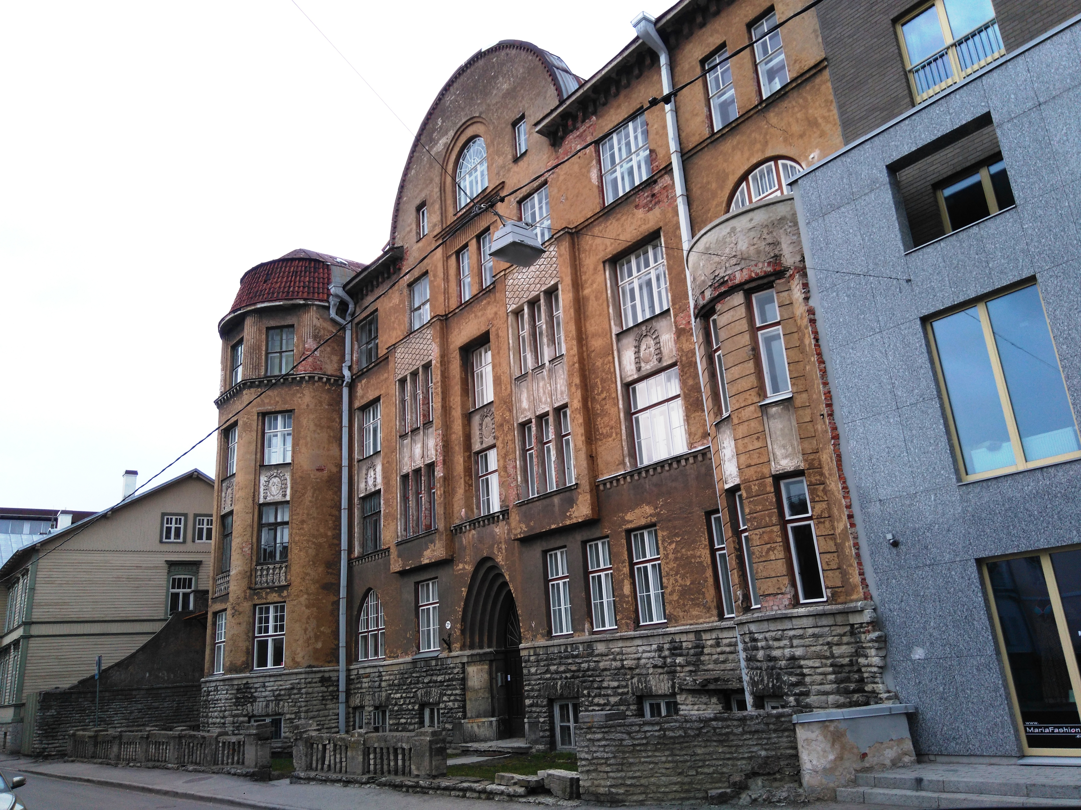 Kultuurimälestis 3125.